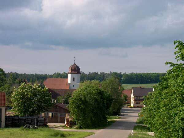 Blick auf Oberschwaningen